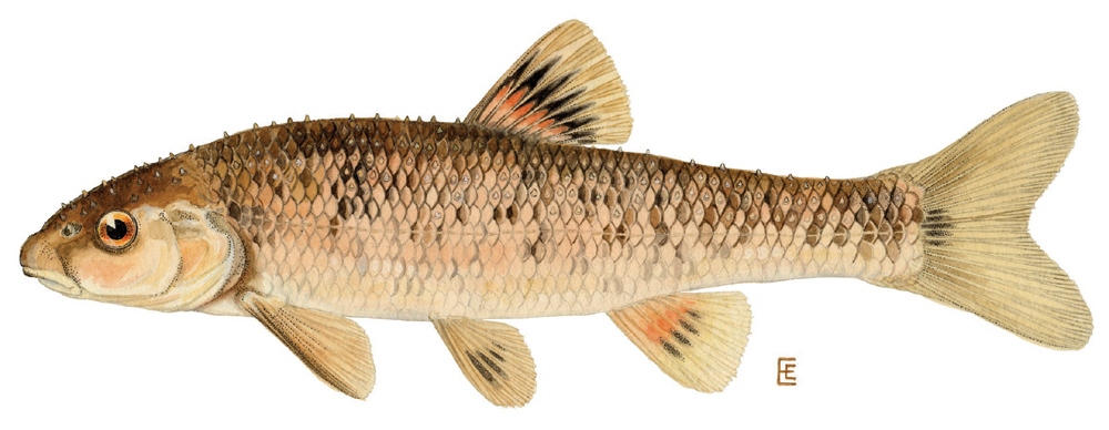 Central stoneroller (Campostoma anomalum)